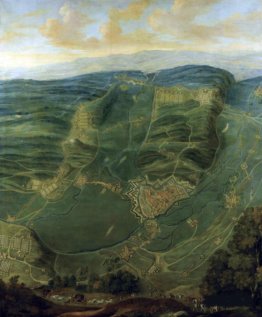 Reprise de Corbie, 14 novembre 1636, tableau attribué à Jacques Callot (1836), musée national des châteaux de Versailles et de Trianon